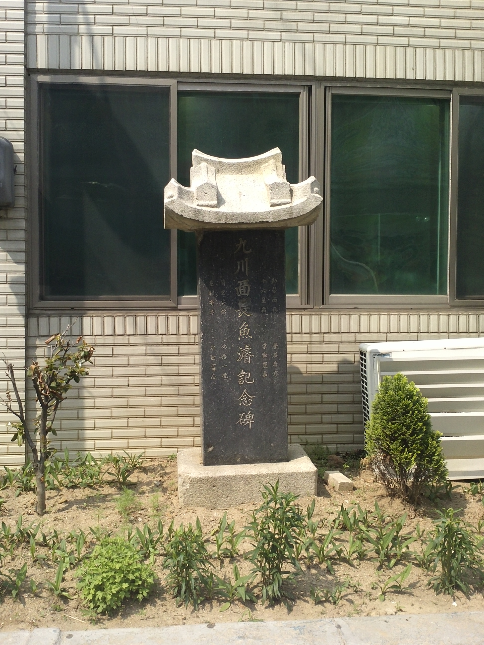 명일1동 사무소 앞에 서 있는 구천면 기념비